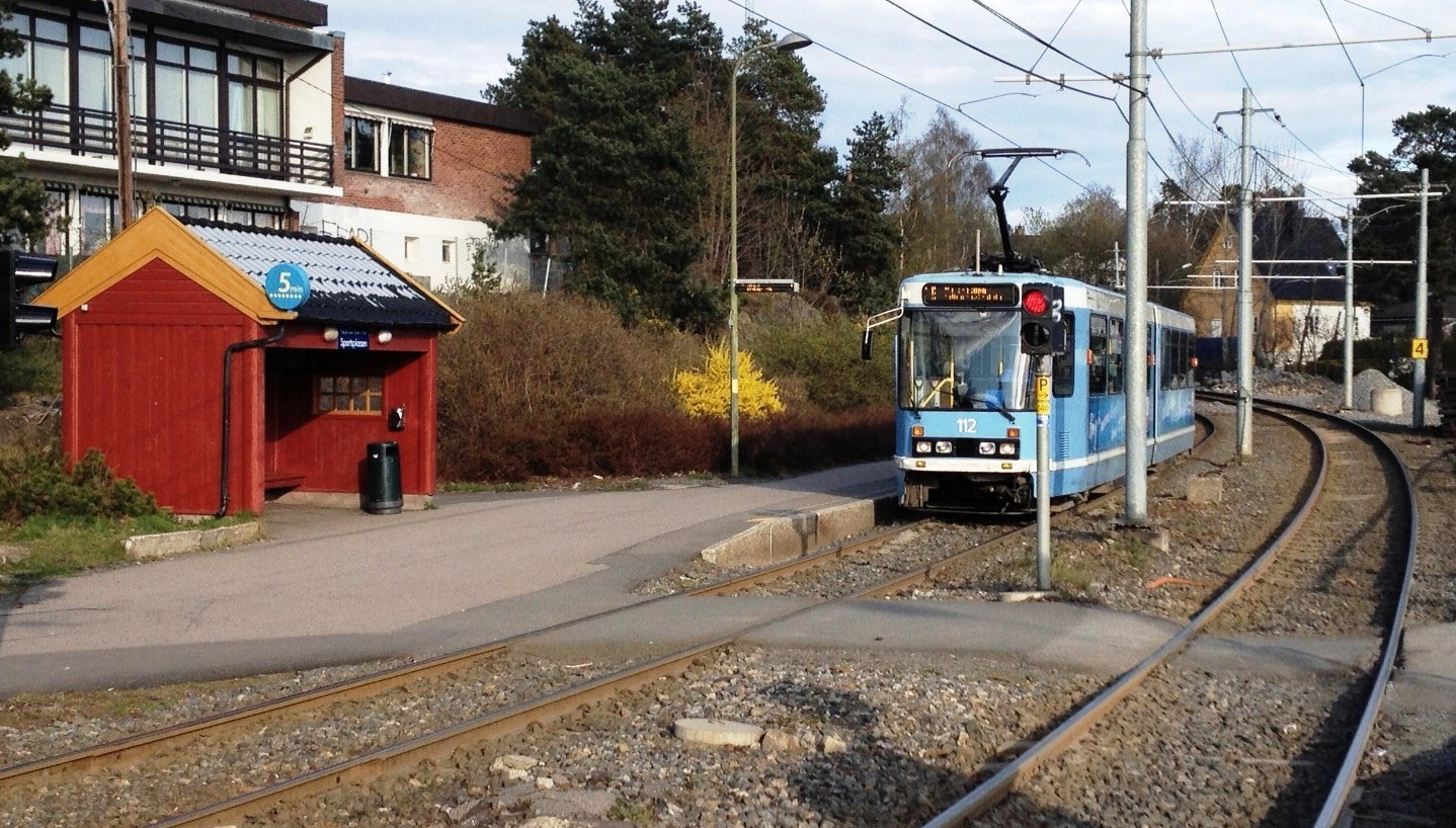 Sportsplassen holdeplass, Ekebergbanen, Oslo